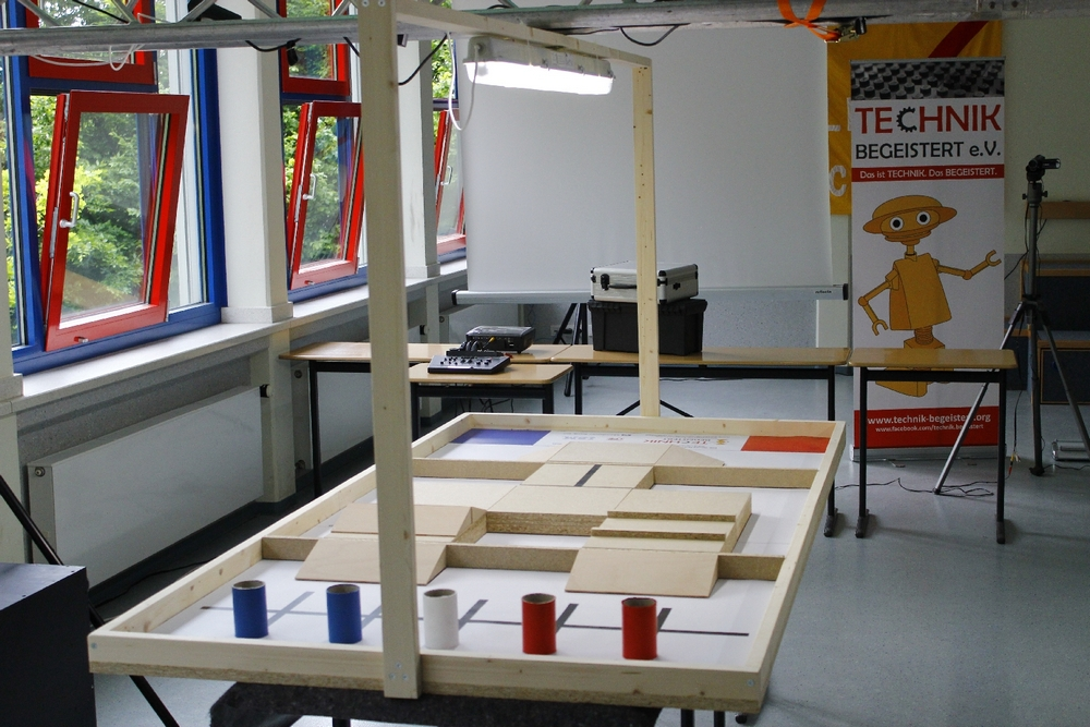 Das Spielfeld WRO Junior 2012. Hier mussten die roten und blauen Dosen (deren Position zufällig war) richtig in die roten und blauen Bereich einsortiert werden.